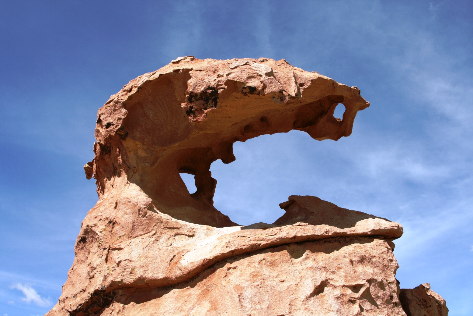 Rock formation in Valle de las Rocas — Reserva Nacional de Fauna Andina Eduardo Avaroa, Uyuni, Bolivia.